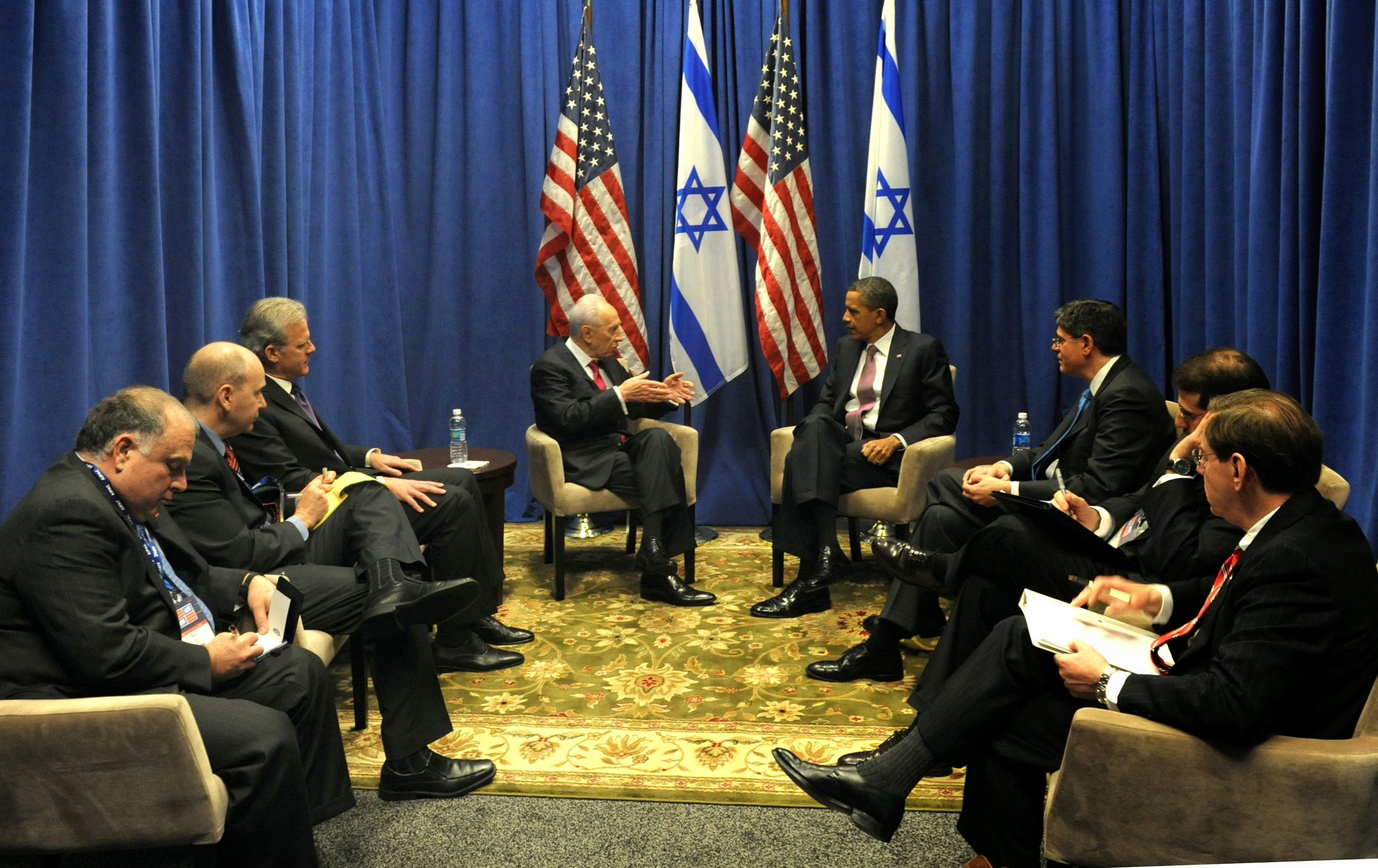 נדב תמיר ונשיא מדינת ישראל, שמעון פרס, עם נשיא ארה"ב, ברק אובמה, בועידת אייפק, 2013